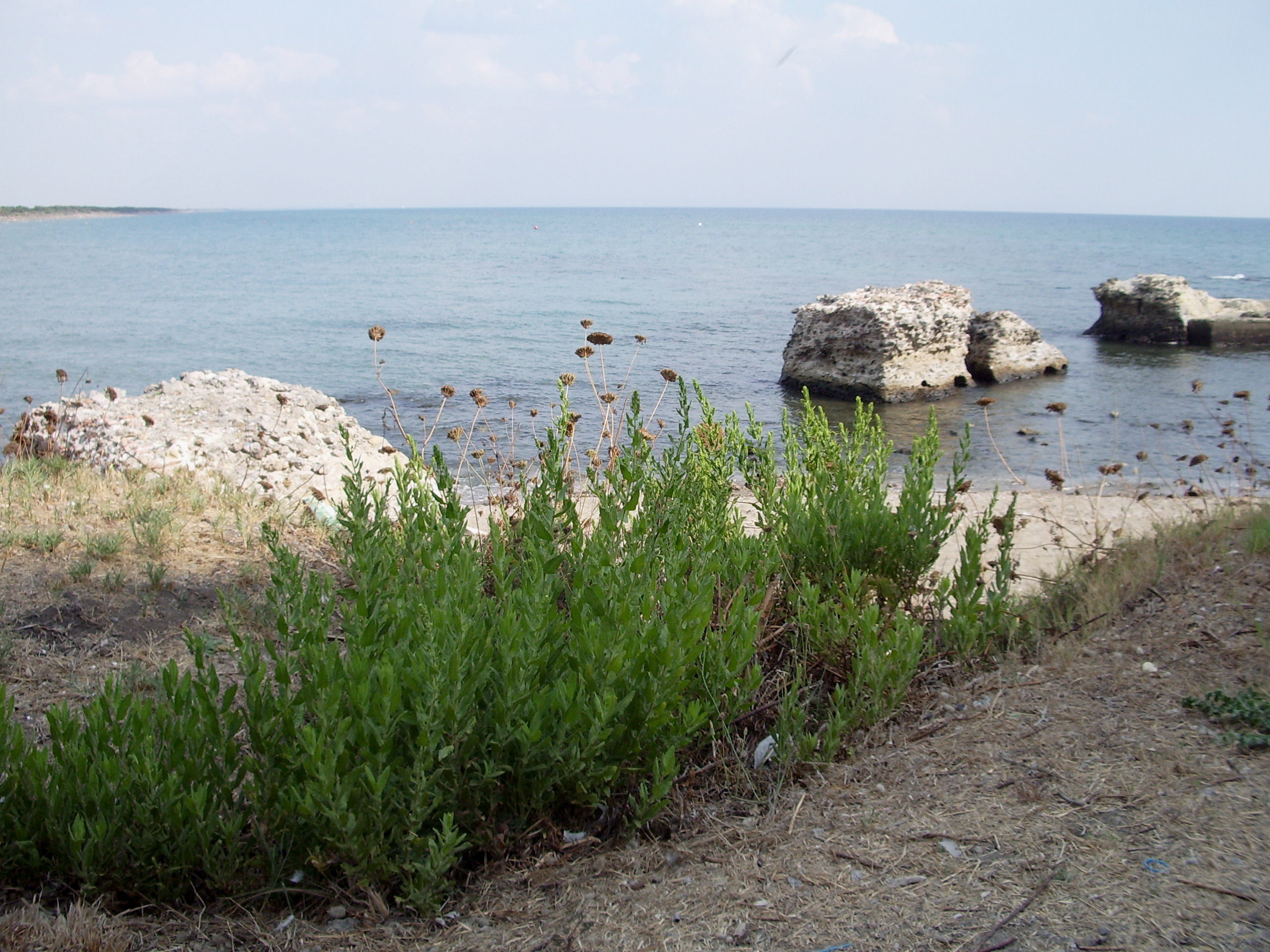 Il Porto di Cosa (GR)